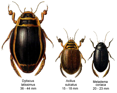 Dytiscidae spec.